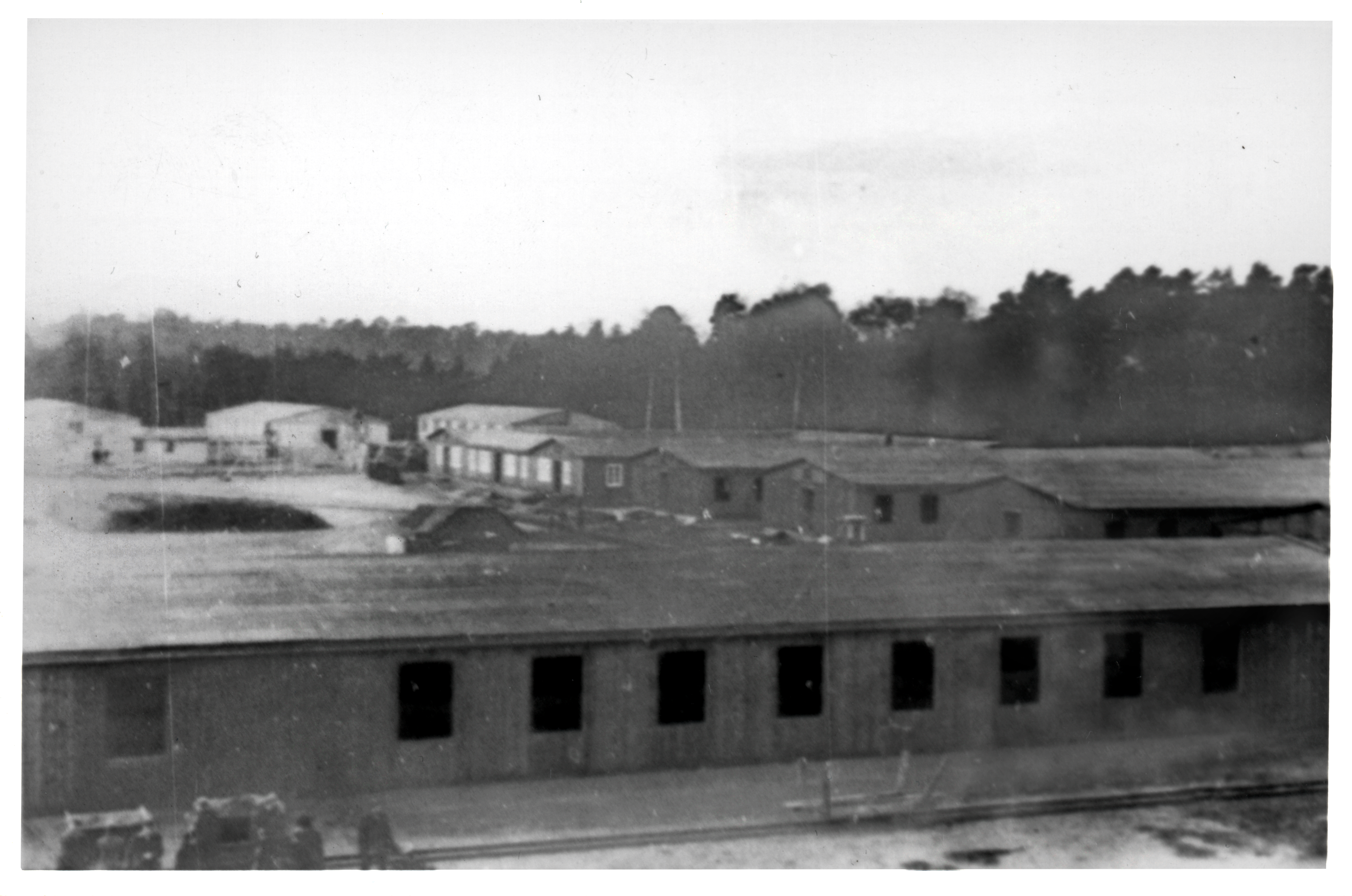 Fotografie dokumentujące budowę obozu niemieckiej Centrali Przesiedleńczej w Potu-licach dla rodzin polskich wysiedlonych z Pomorza.